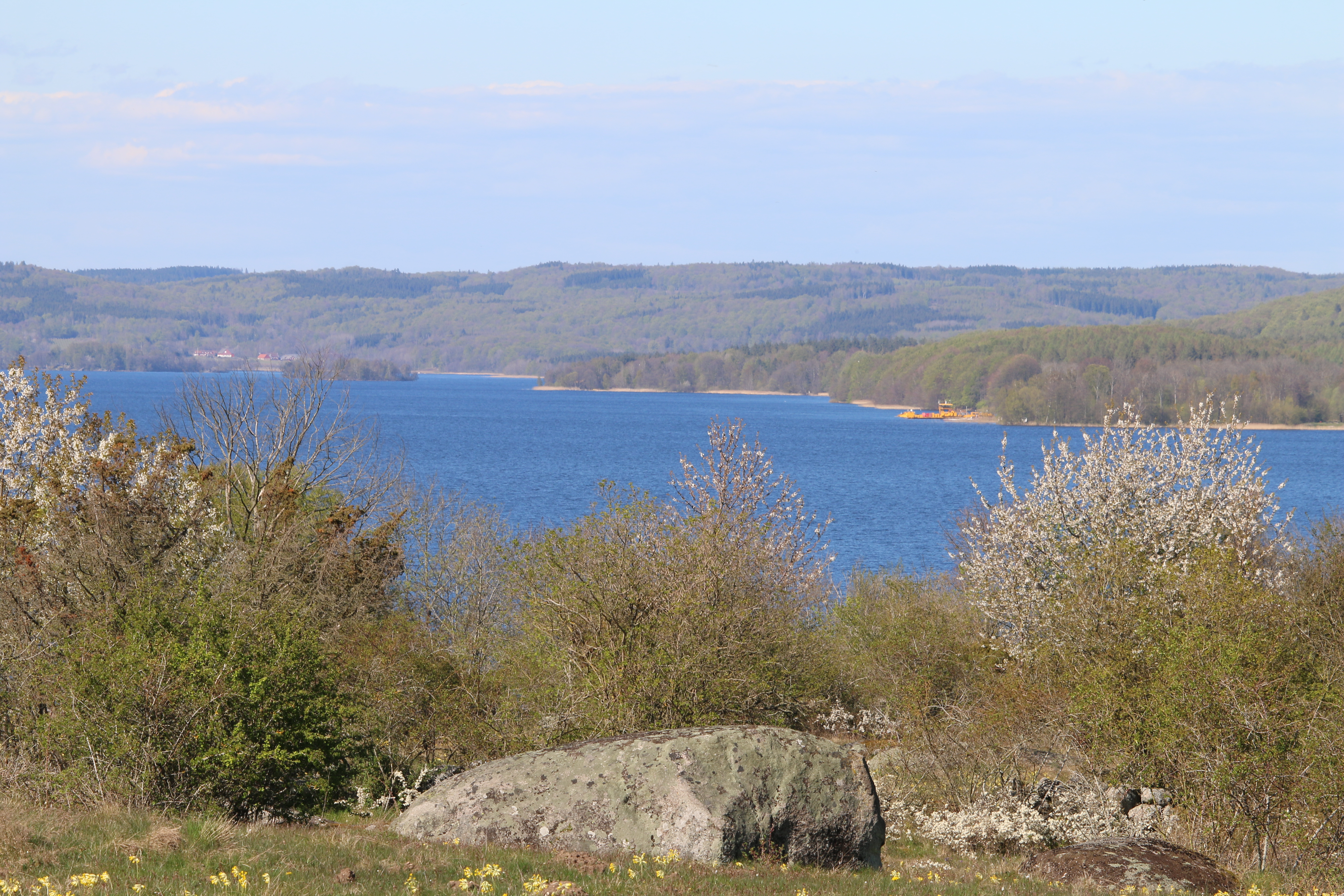 Ivösjön från Kjugekull